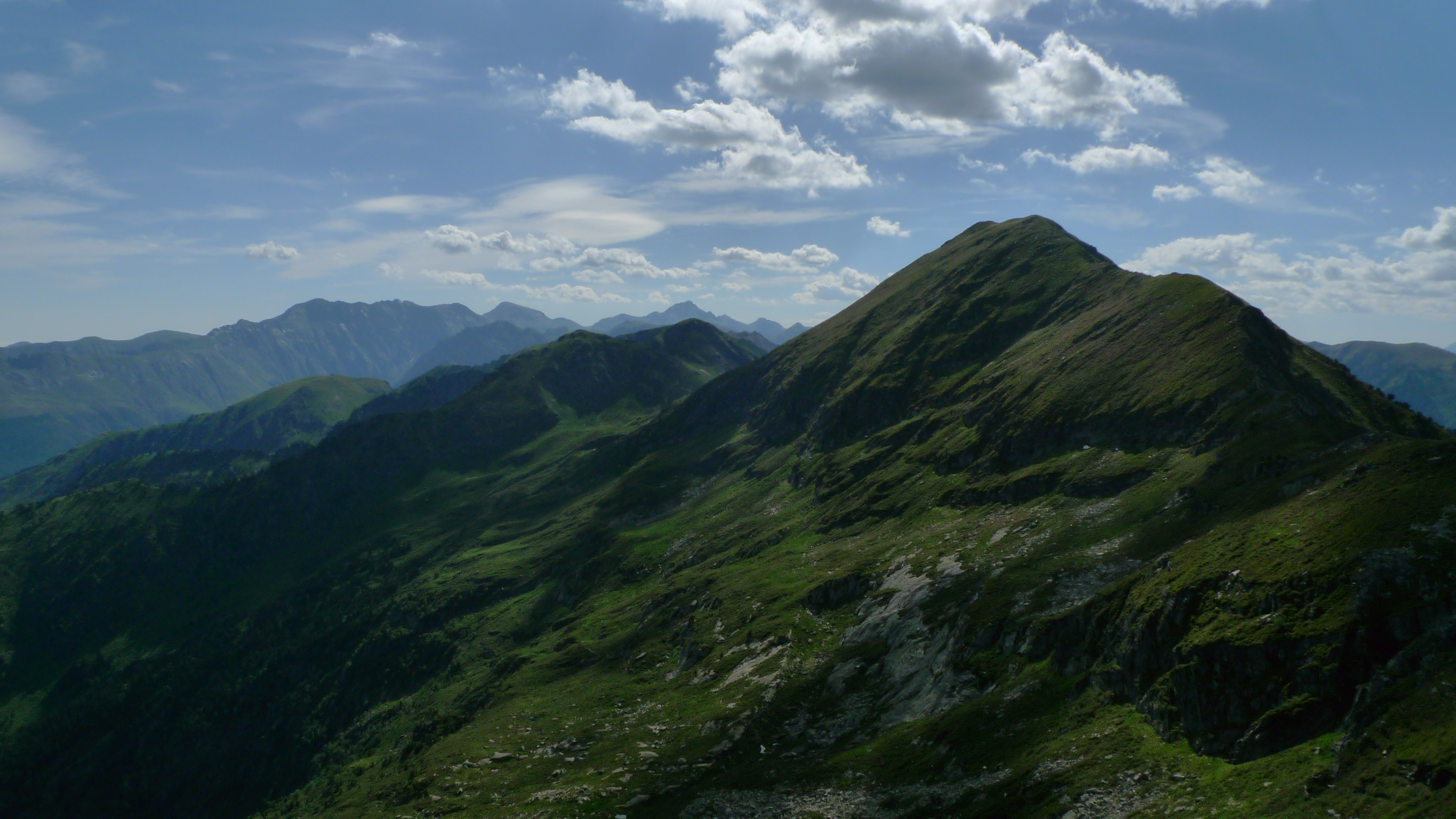 Montlude This is a a photo of an emblematic summit in Catalonia, Spain, with id: CE-255059006